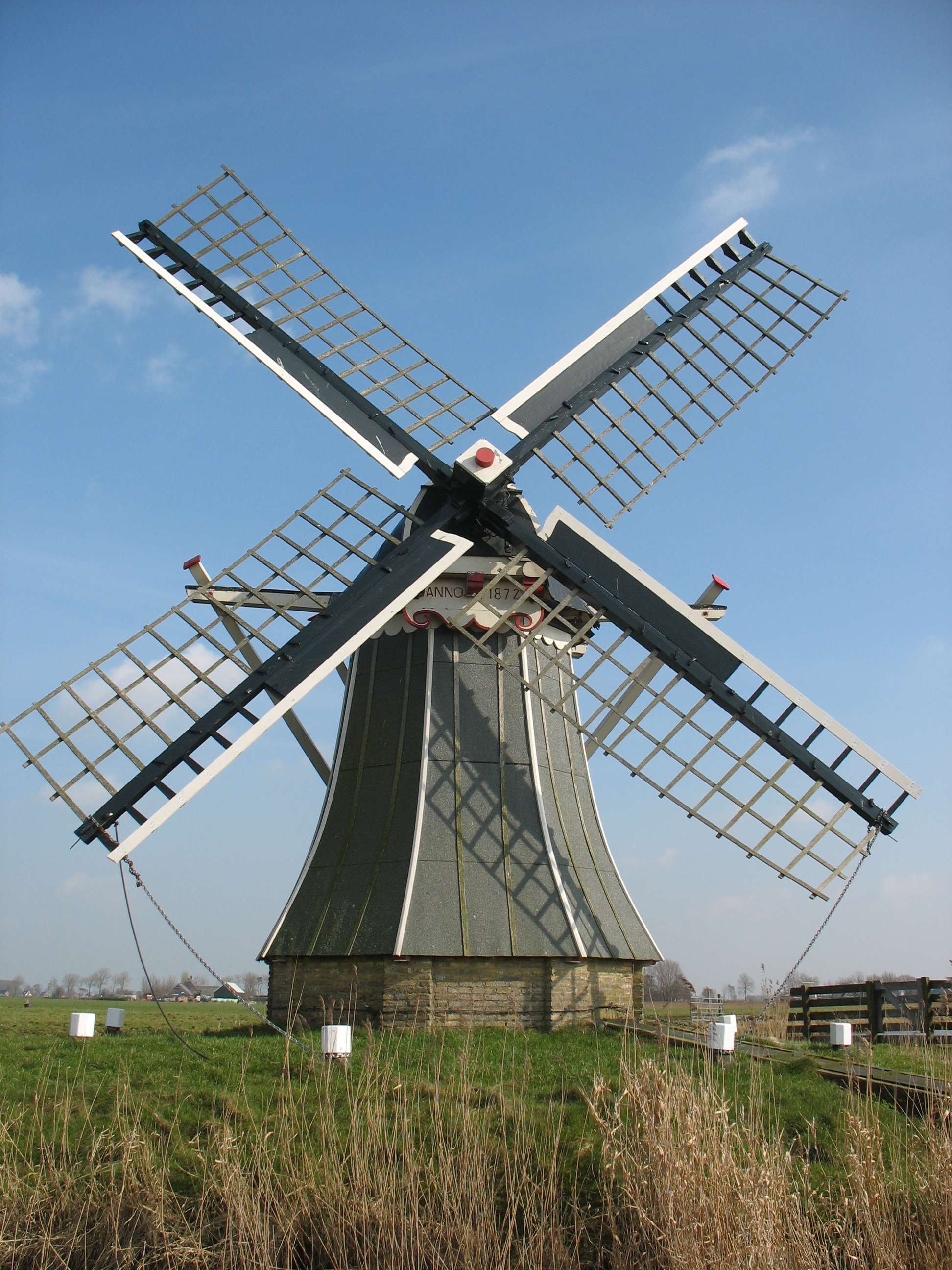 Dit is een foto van poldermolen de Volharding bij Jislum.